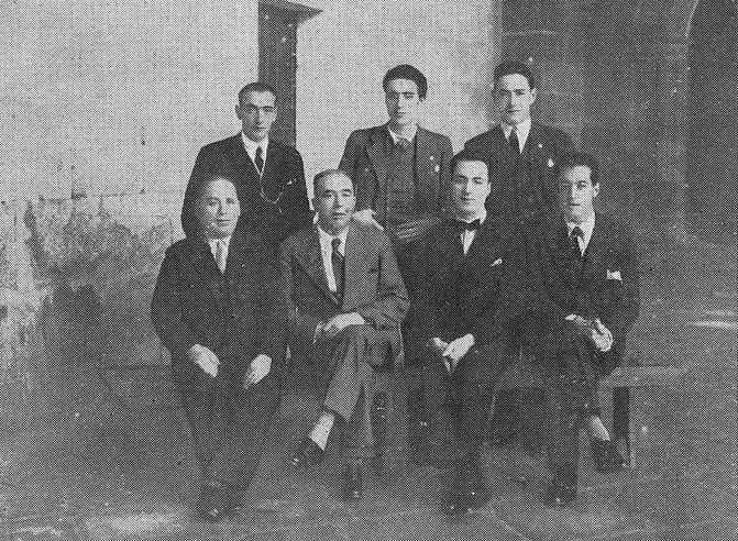 Comité da homenaxe a Manuel Lezón. Celanova 1932. Aparecen: Domínguez, Fernández, Meleiro, Gullón, Moreiras, Fernández e Xosé Velo